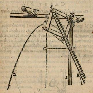 Parabelzirkel des Frans van Schooten (1657)